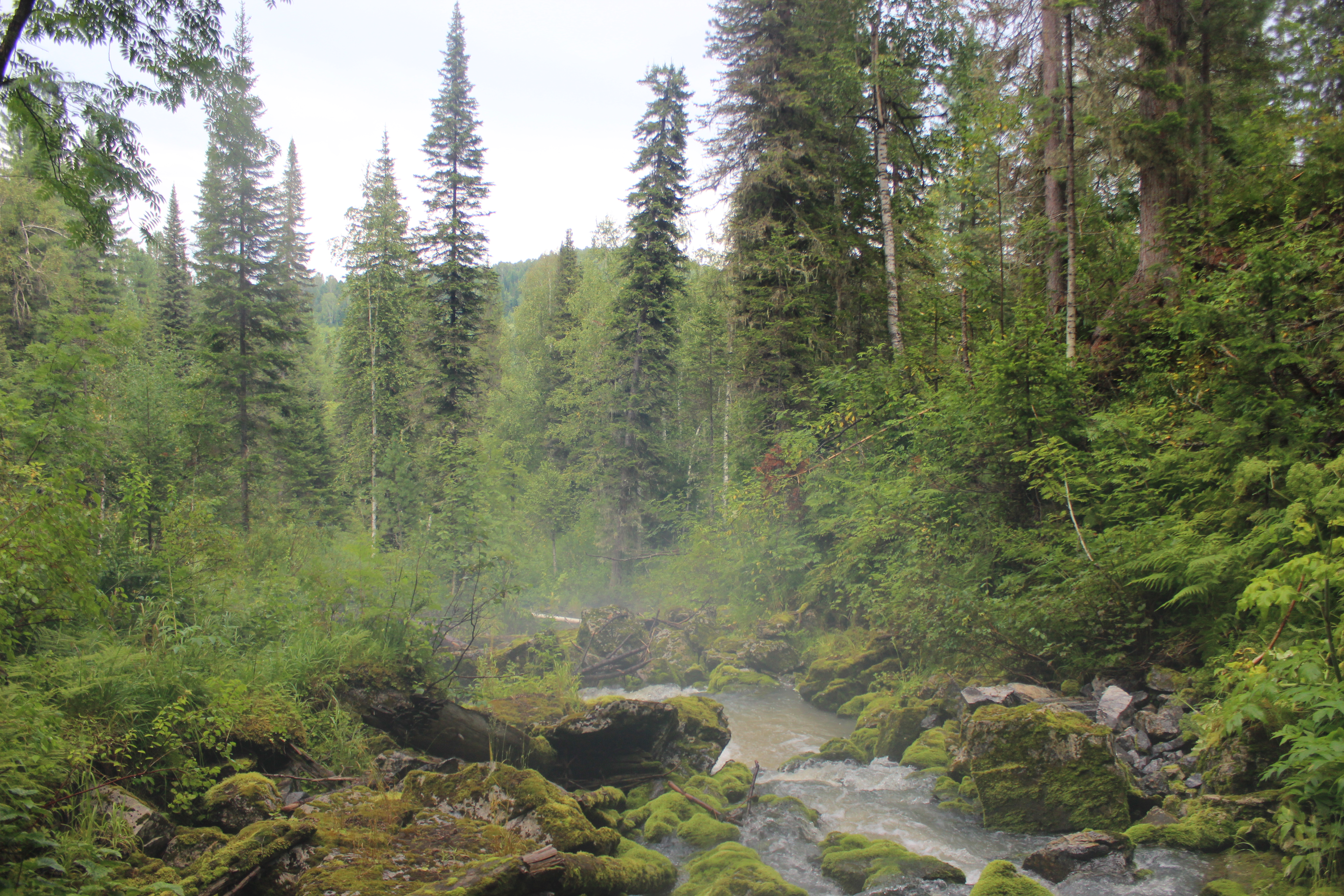 Шорский, Таштагольский район This image is related to the protected area of Russia number 4200024